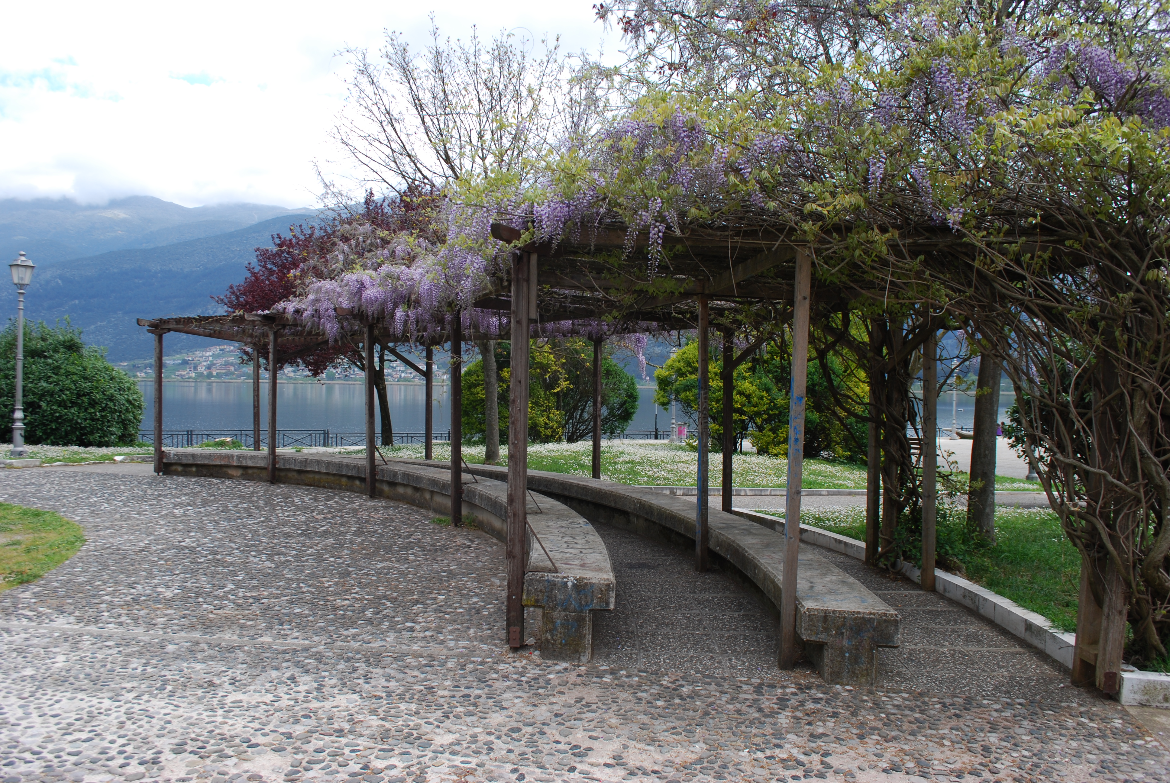 Vue de Ioannina.